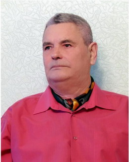 портрет писателя Виктора Ивановича Герасина